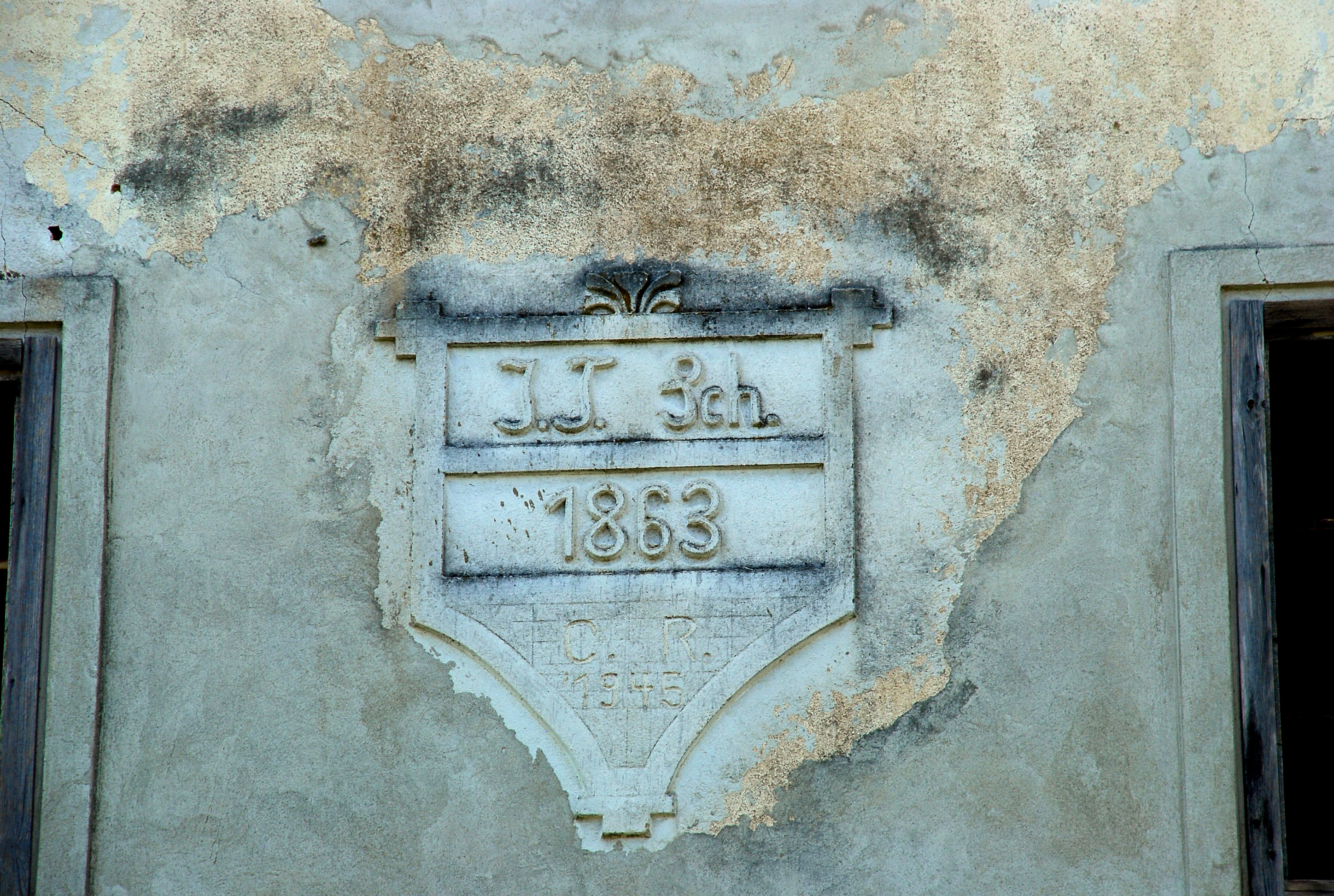 Frauental an der Laßnitz, Ortsteil Schamberg, Steiermark, Österreich: denkmalgeschütztes Haus (Rotschädlhaus, Erzherzog Johann Haus)